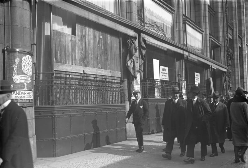 Zu den grossen Tumulten in der Leipziger Straße in Berlin am Tage der Reichstagseröffnung, wo viele Schaufensterscheiben zertrümmert wurden. Mit Brettern vernagelte und gesicherte Schaufenster des Warenhauses Wertheim in Berlin.